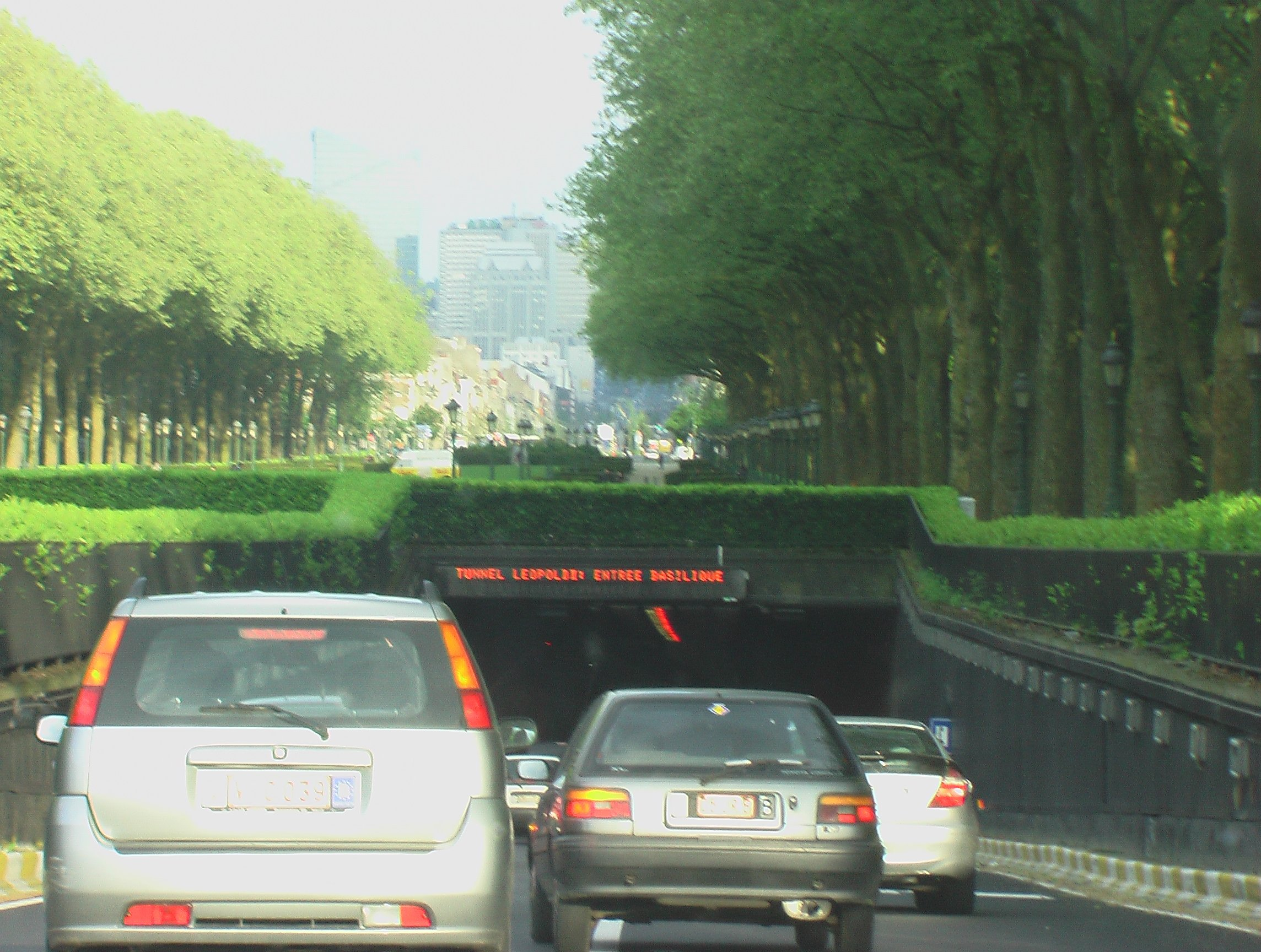 ingang Leopold II-tunnel